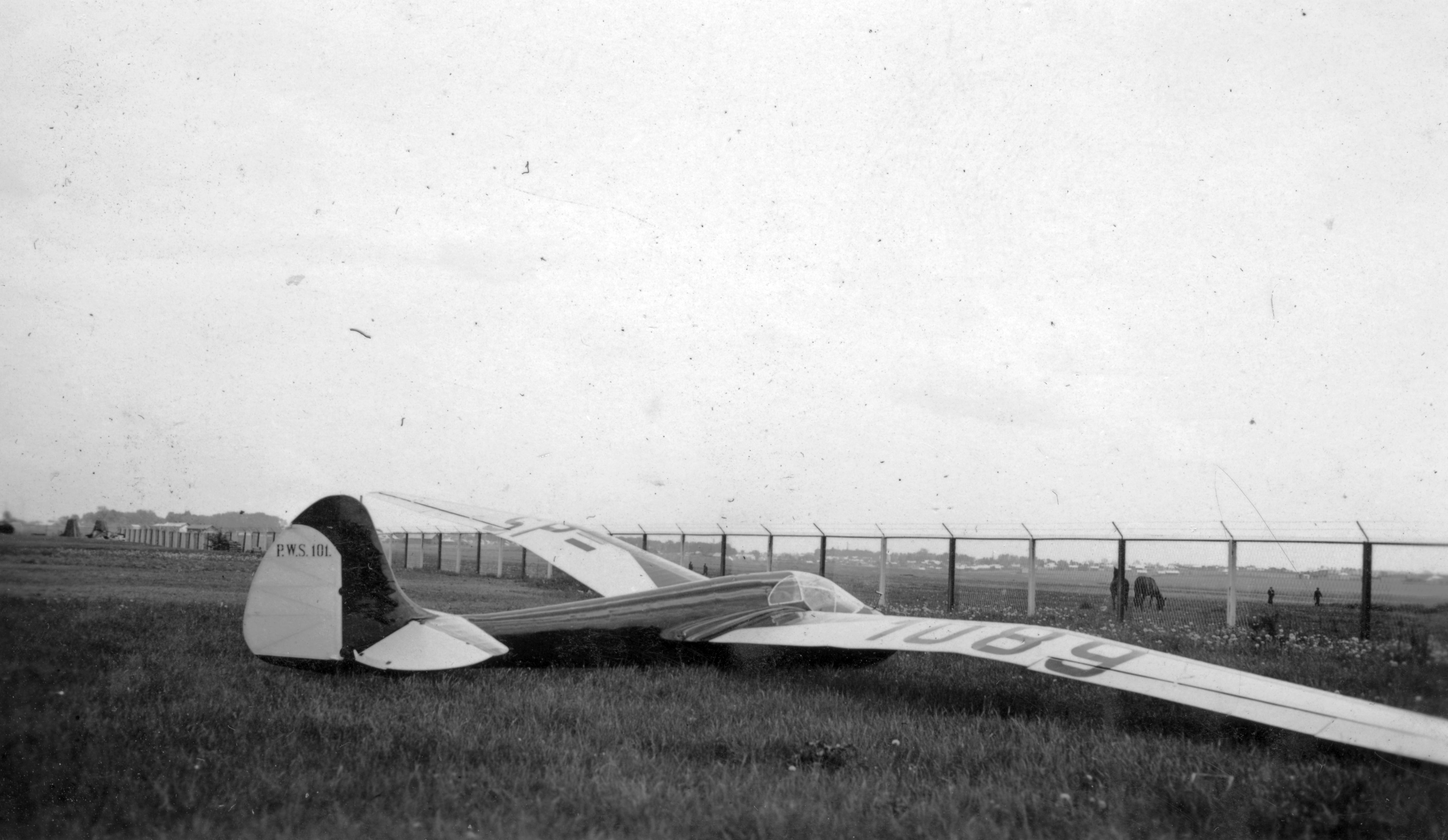 PWS-101 típusú vitorlázó repülőgép. Location: Poland Tags: sailplane, airport, PWS-brand, Polish brand, airplane, flying Title: PWS-101 típusú vitorlázó repülőgép.